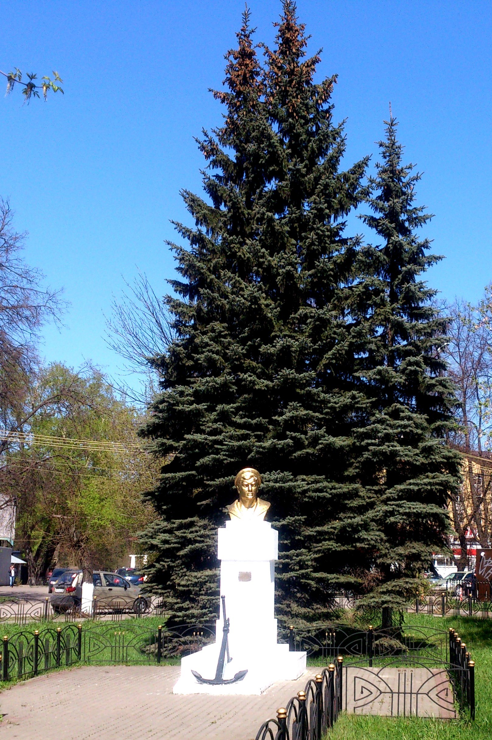 Памятник А. Г. Железнякову: Ленина площадь, Ногинск, Ногинский район, Московская область